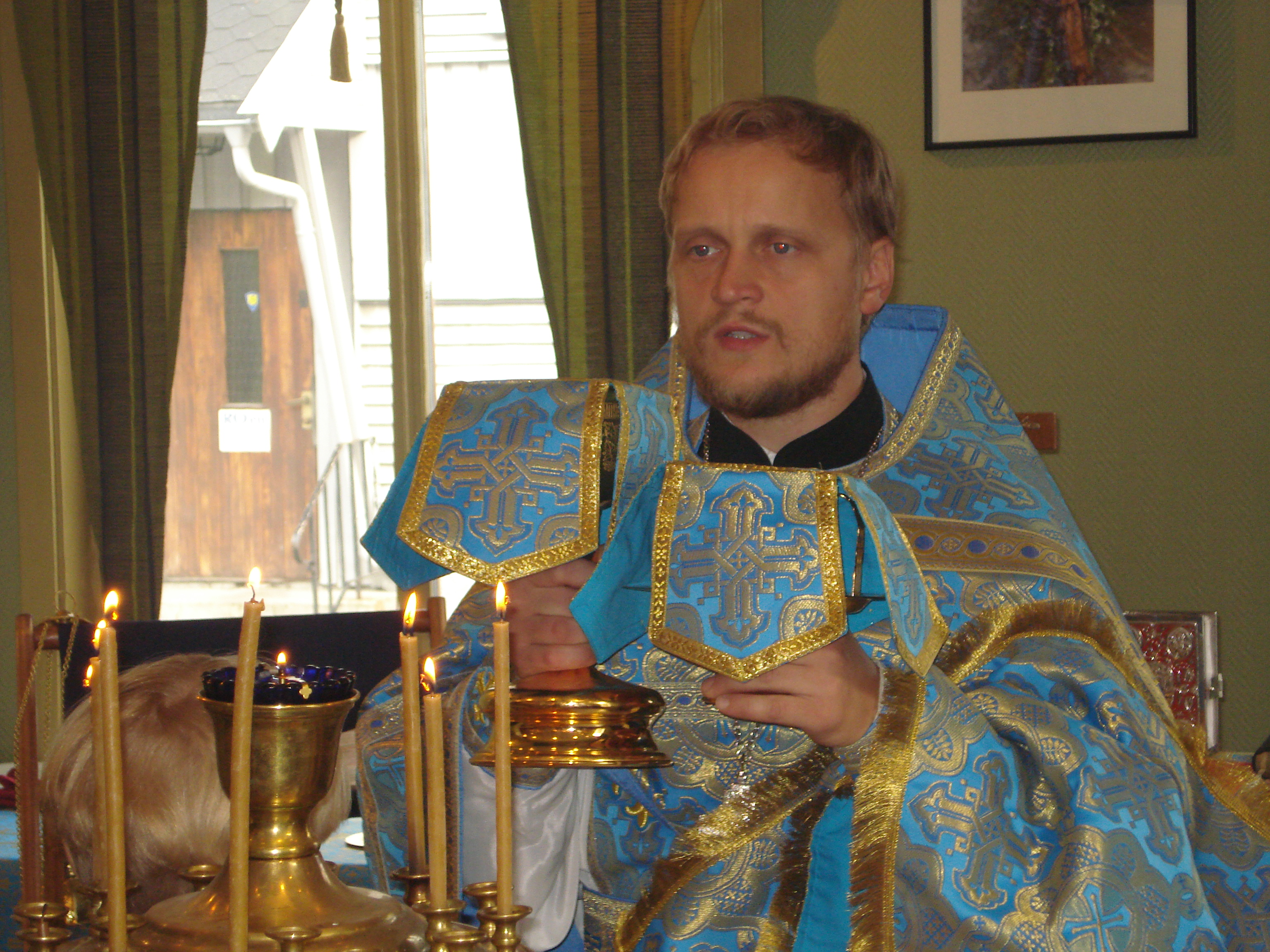 f. Alexandr Volohan